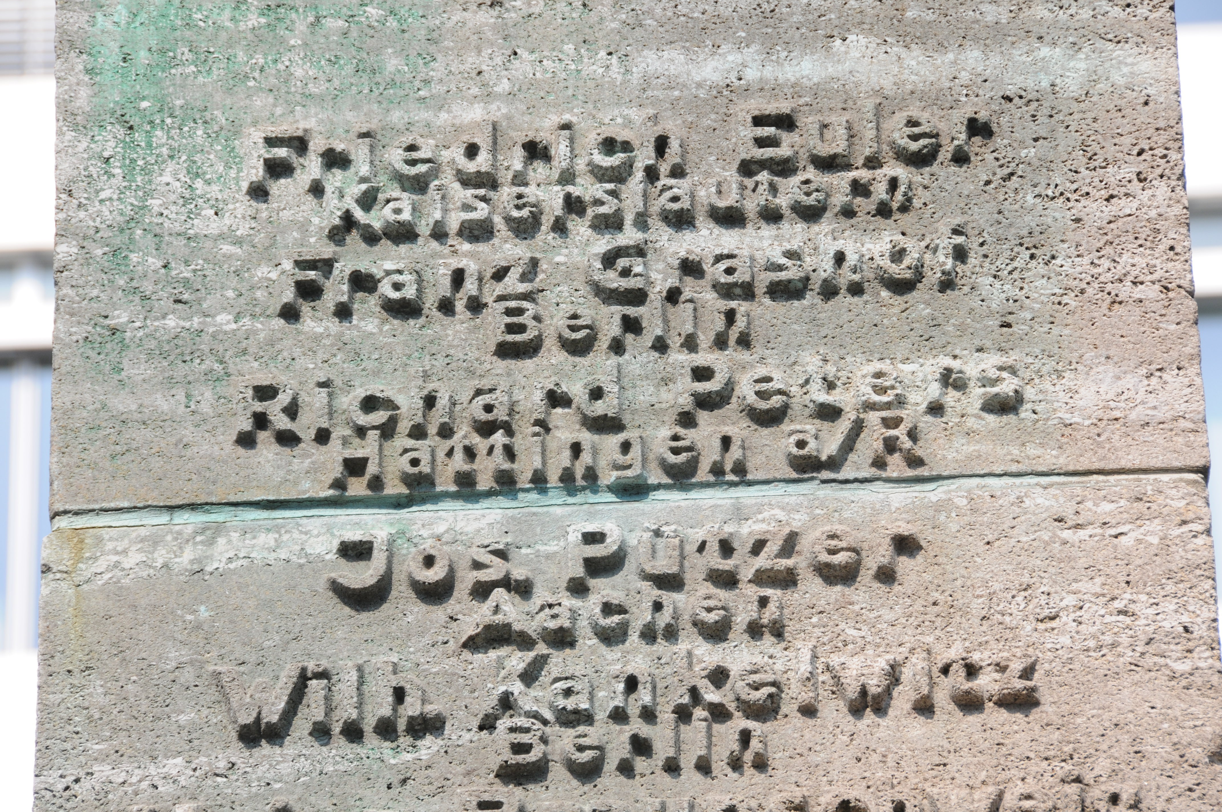 Ausschnitt aus der im Innenhof des VDI-Hauses stehenden Säule des VDI-Denkmals mit den Gründernamen Euler, Grashof, Peters, Pützer und Kankewitz